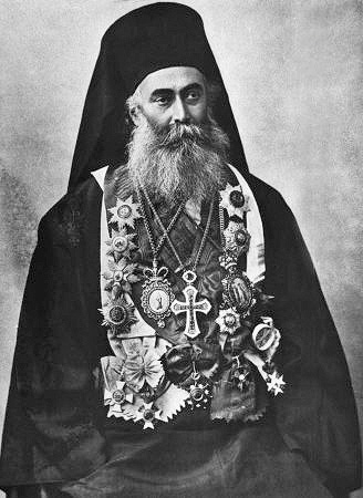 Δαμιανός Α΄, πατριάρχης Ιεροσολύμων